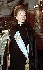 Excelencia, señora María Estela Martínez Cartas de Perón, expresidenta de Argentina.